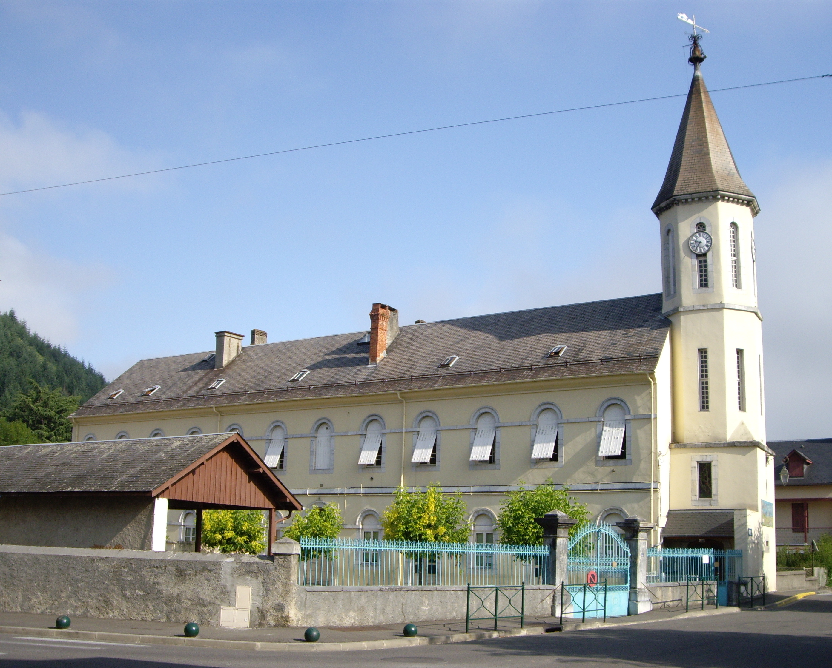 École de Pouzac (65)